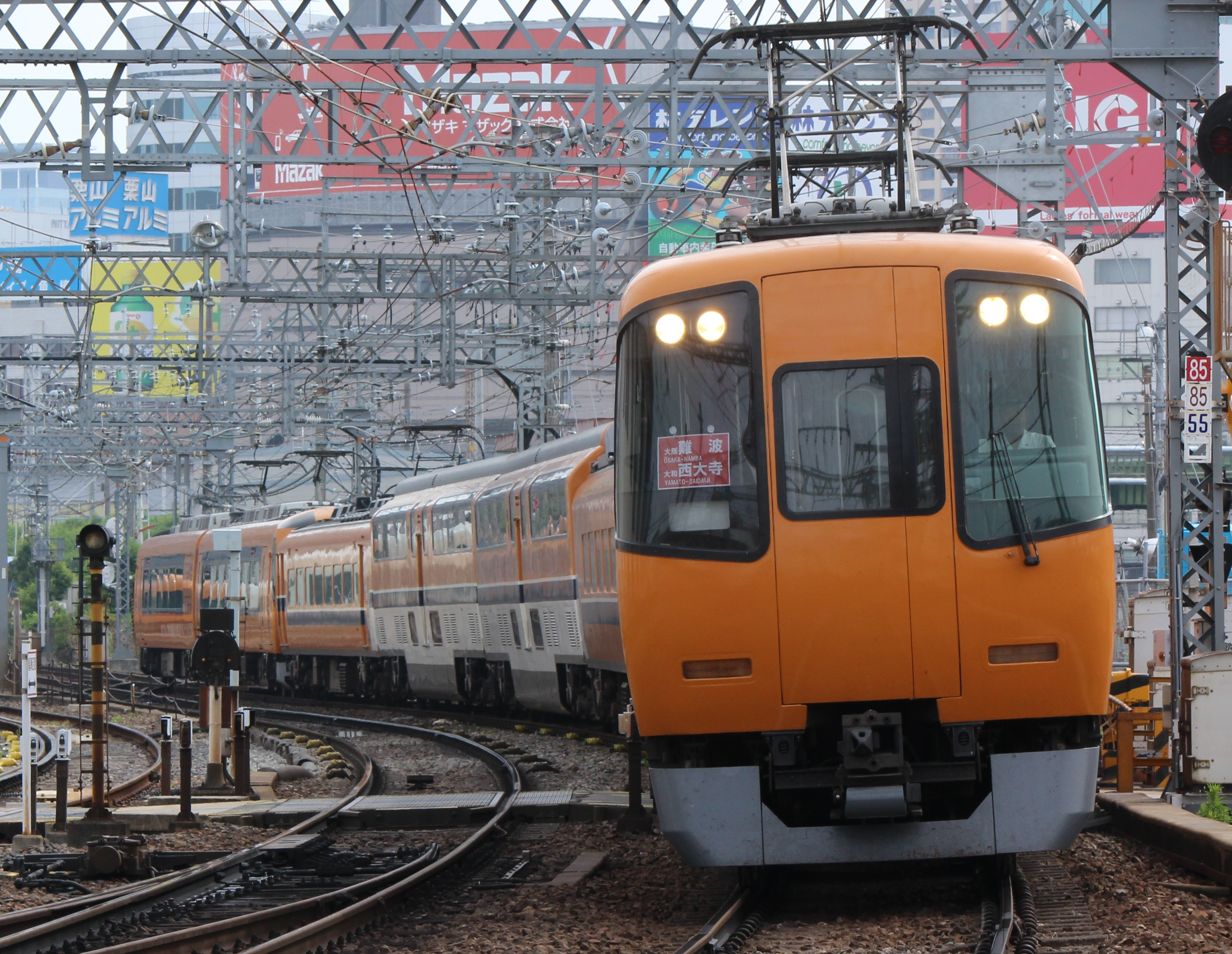 名阪特急に併結された名奈特急